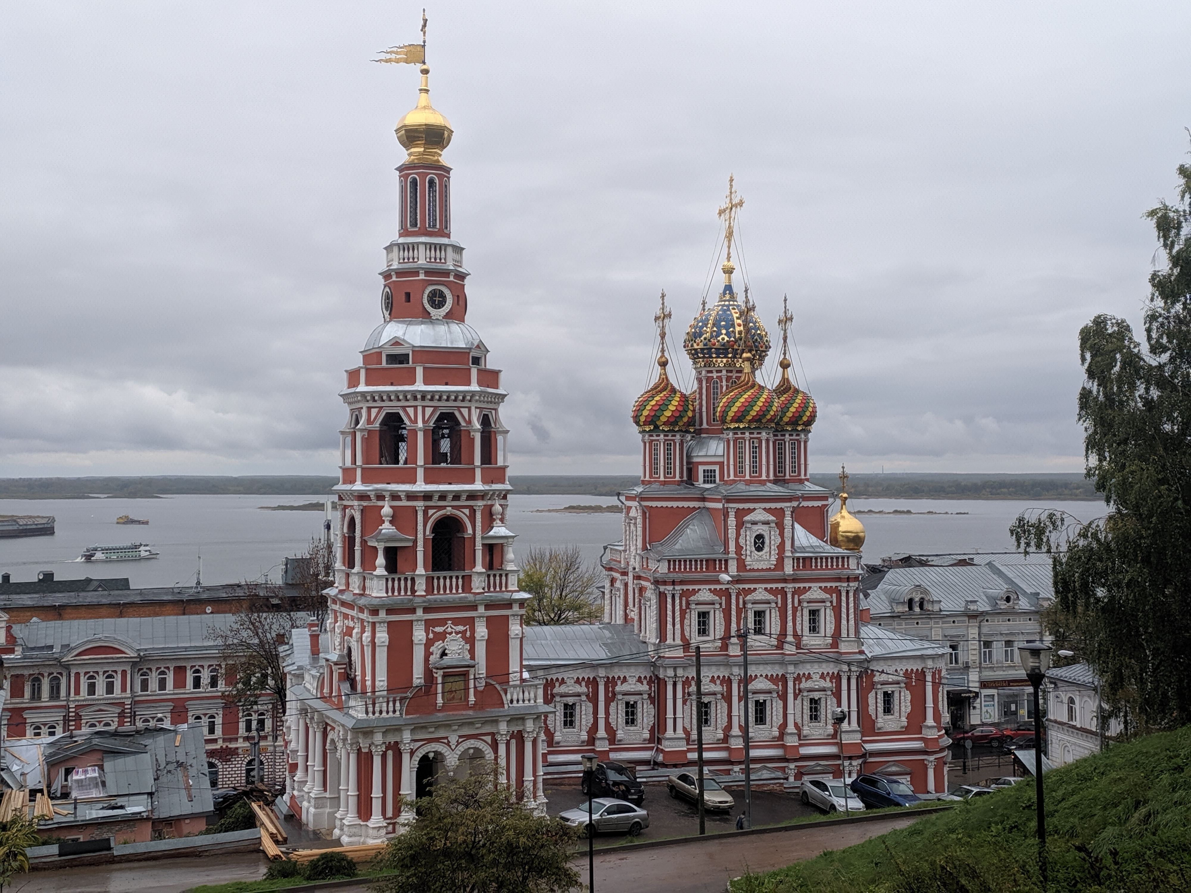 Ансамбль церкви Рождества Богородицы: улица Рождественская (бывш.Маяковского), 34, Суетинская улица, 23, Нижний Новгород, Нижегородская область